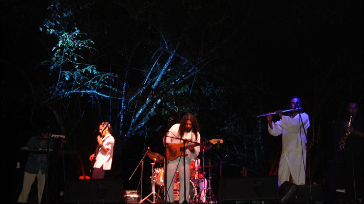 Gallina Negra en concierto en Palenque, Chiapas, México.